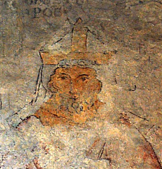 Pražský biskup Jan